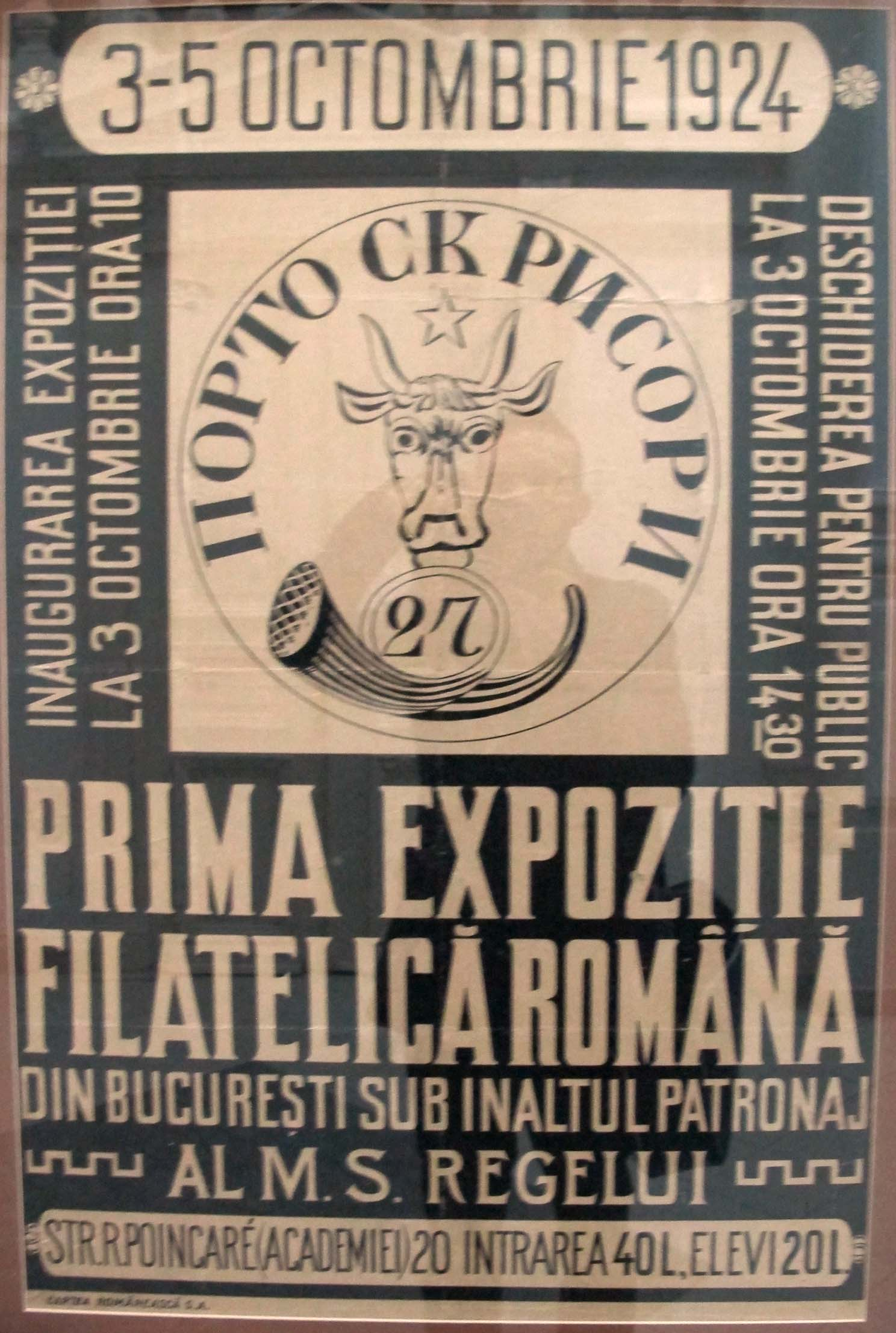 Poster prima esposizione filatelica rumena, 1924